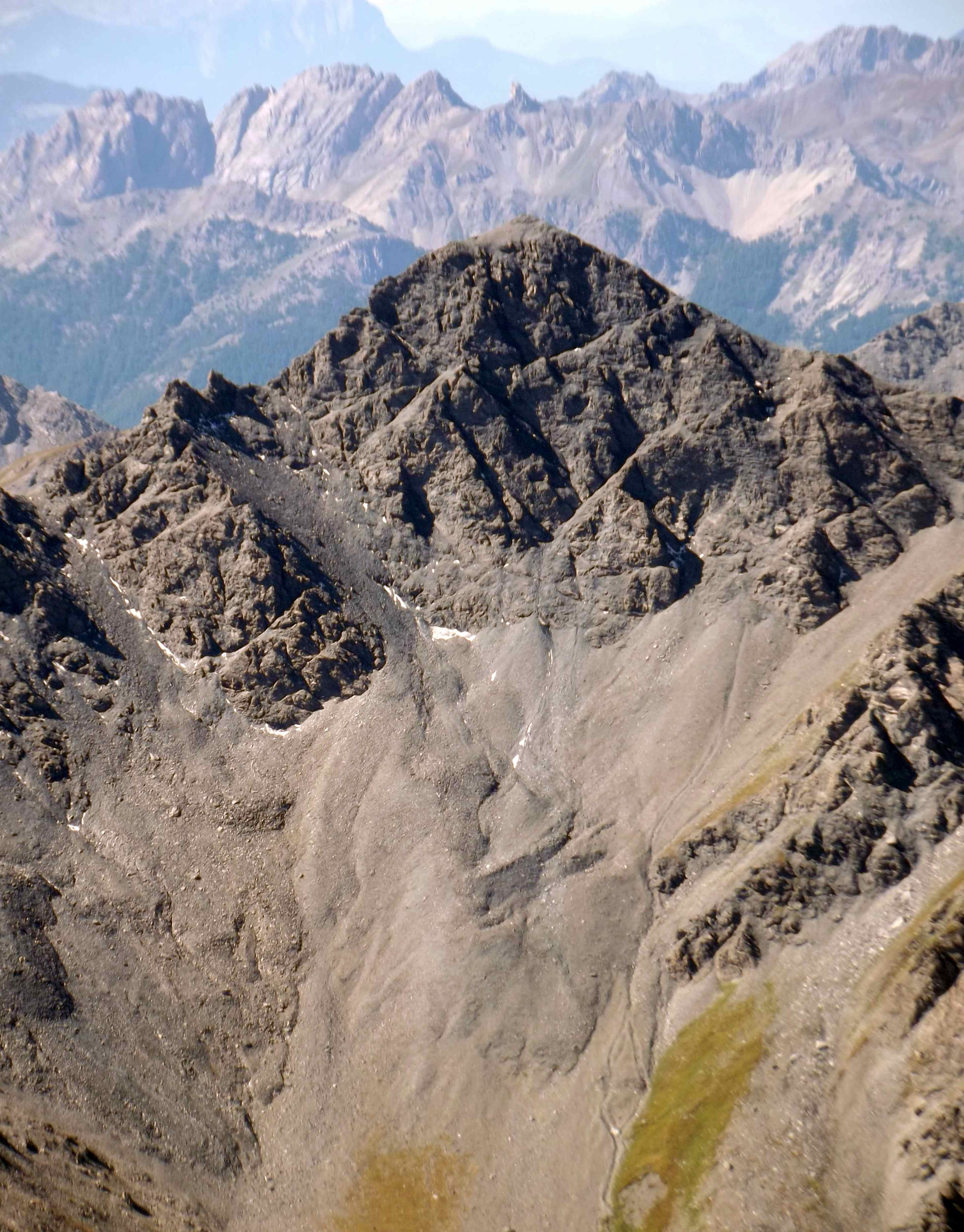 Il pic de Petit Rochebrune (alpi Cozie) visto dalla punta Merciantaira